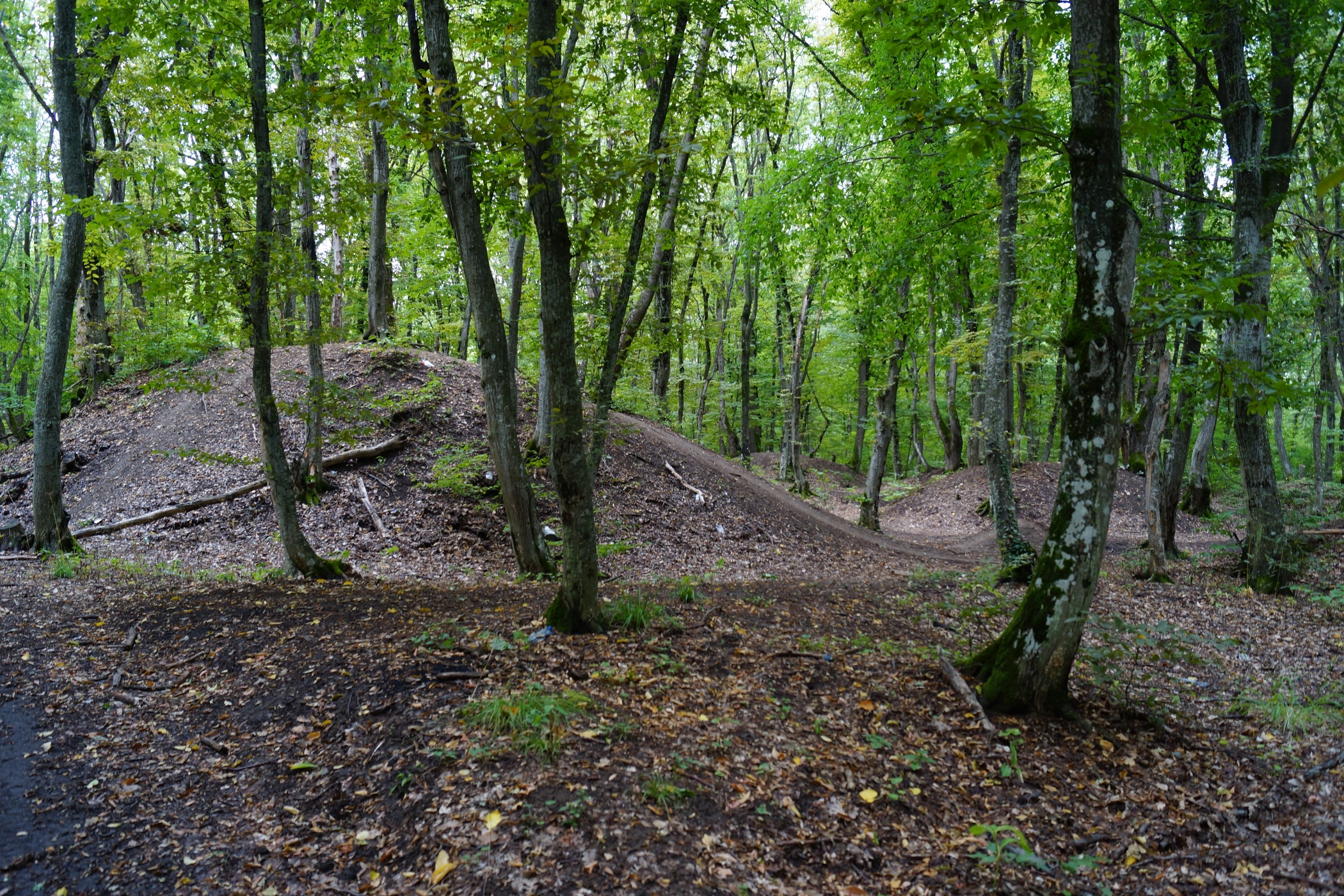 Курганы в лесу за поселком Черноморским